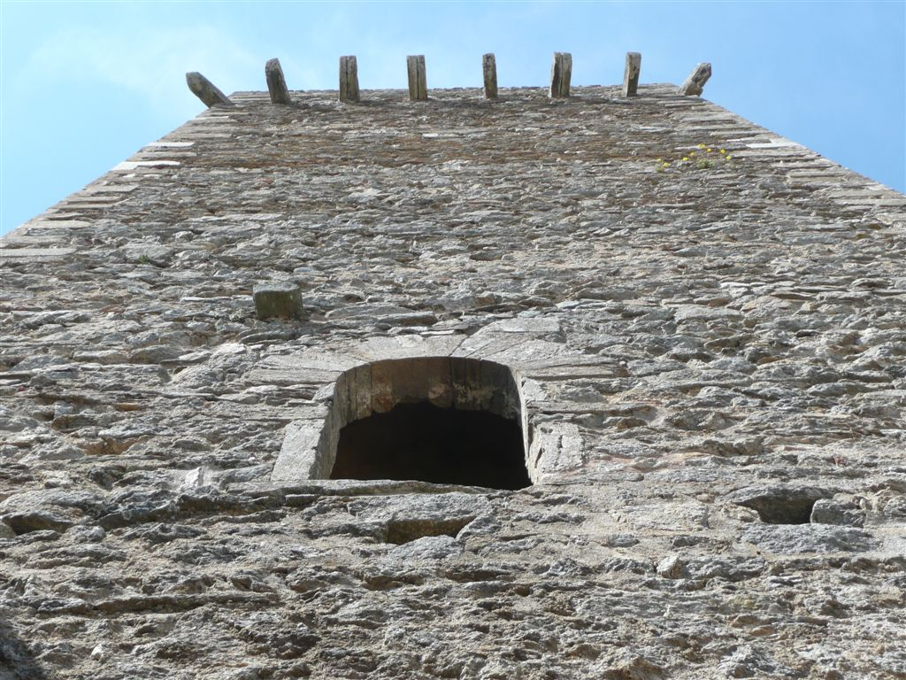 Monestir de Sant Pere de Rodes (el Port de la Selva, Alt Empordà, Catalunya). Torre de defensa.